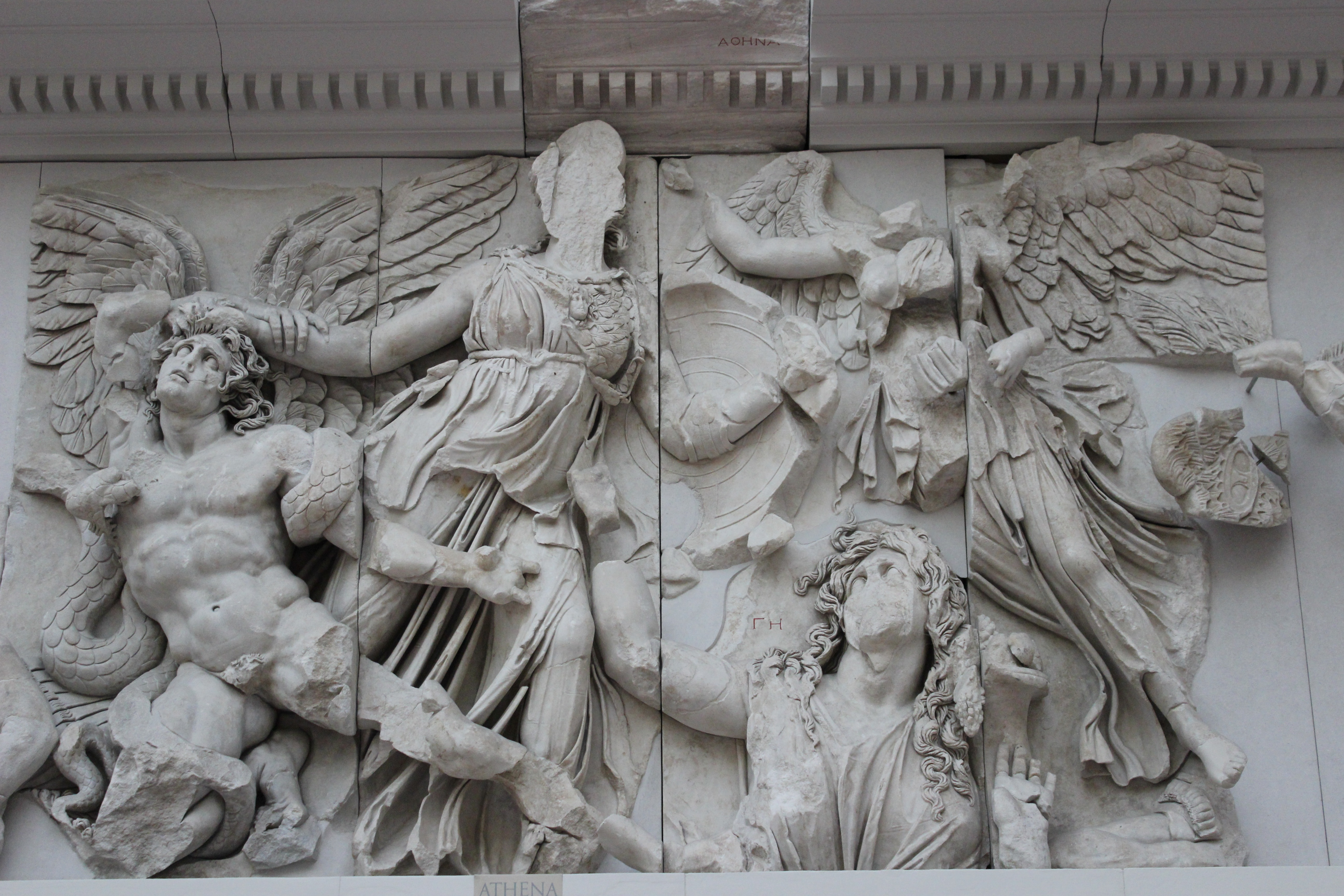 Atenea lucha con Alcioneo en presencia de Gea. Altar de Pérgamo.